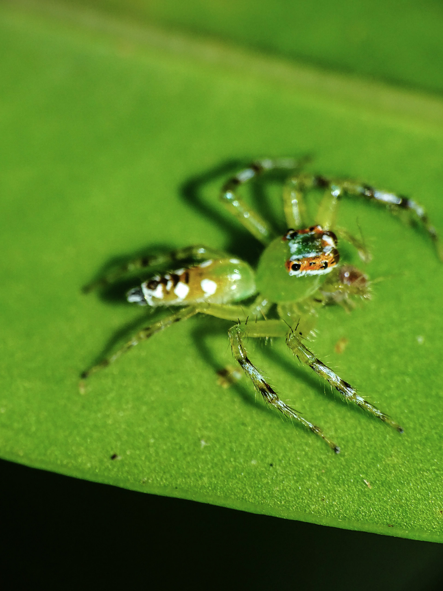 Epeus sp. From Ezhupunna